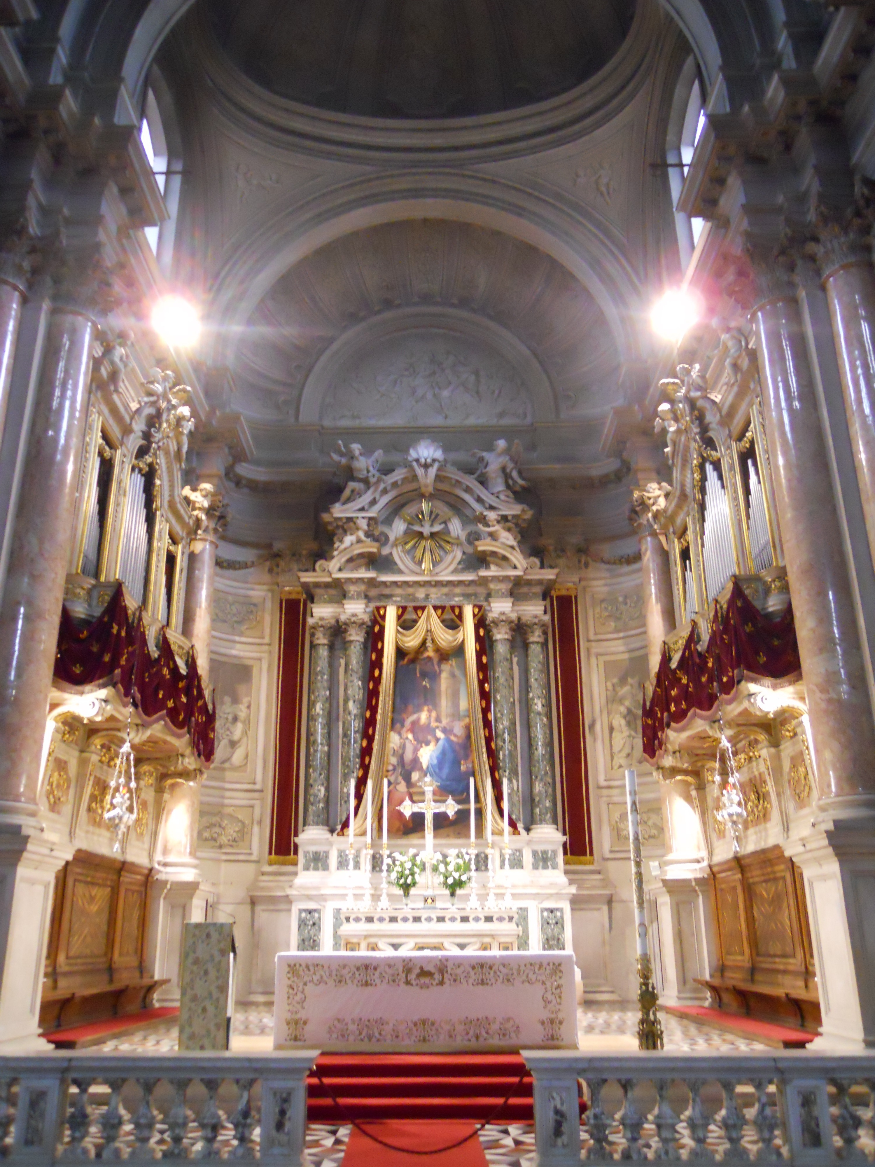 santa maria della pace (brescia) altare maggiore.jpg